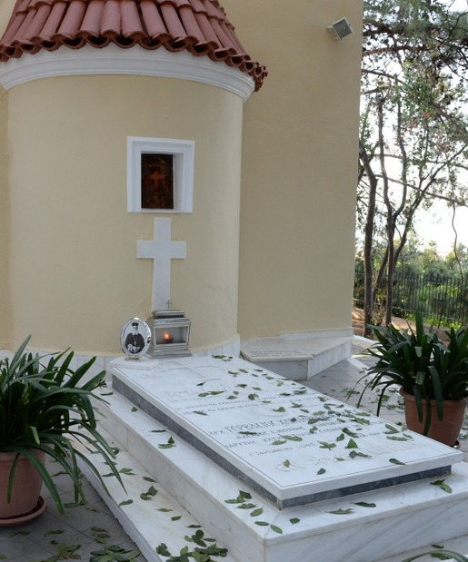 Ο τάφος του π. Γερβασίου στο Ναό Αγίας Παρασκευής Συχαινών